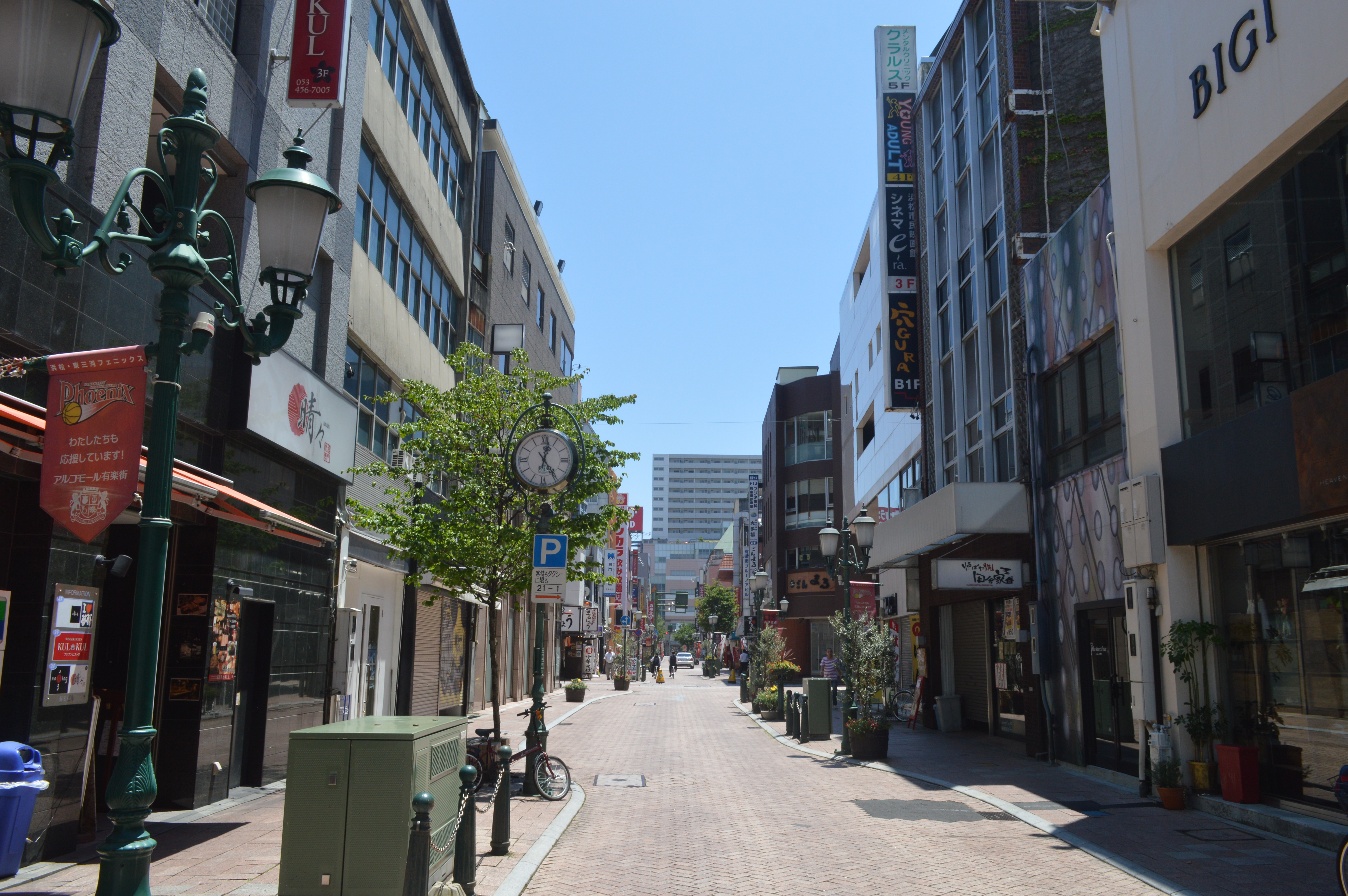 浜松市の中心市街地である田町にある商店街「有楽街」。